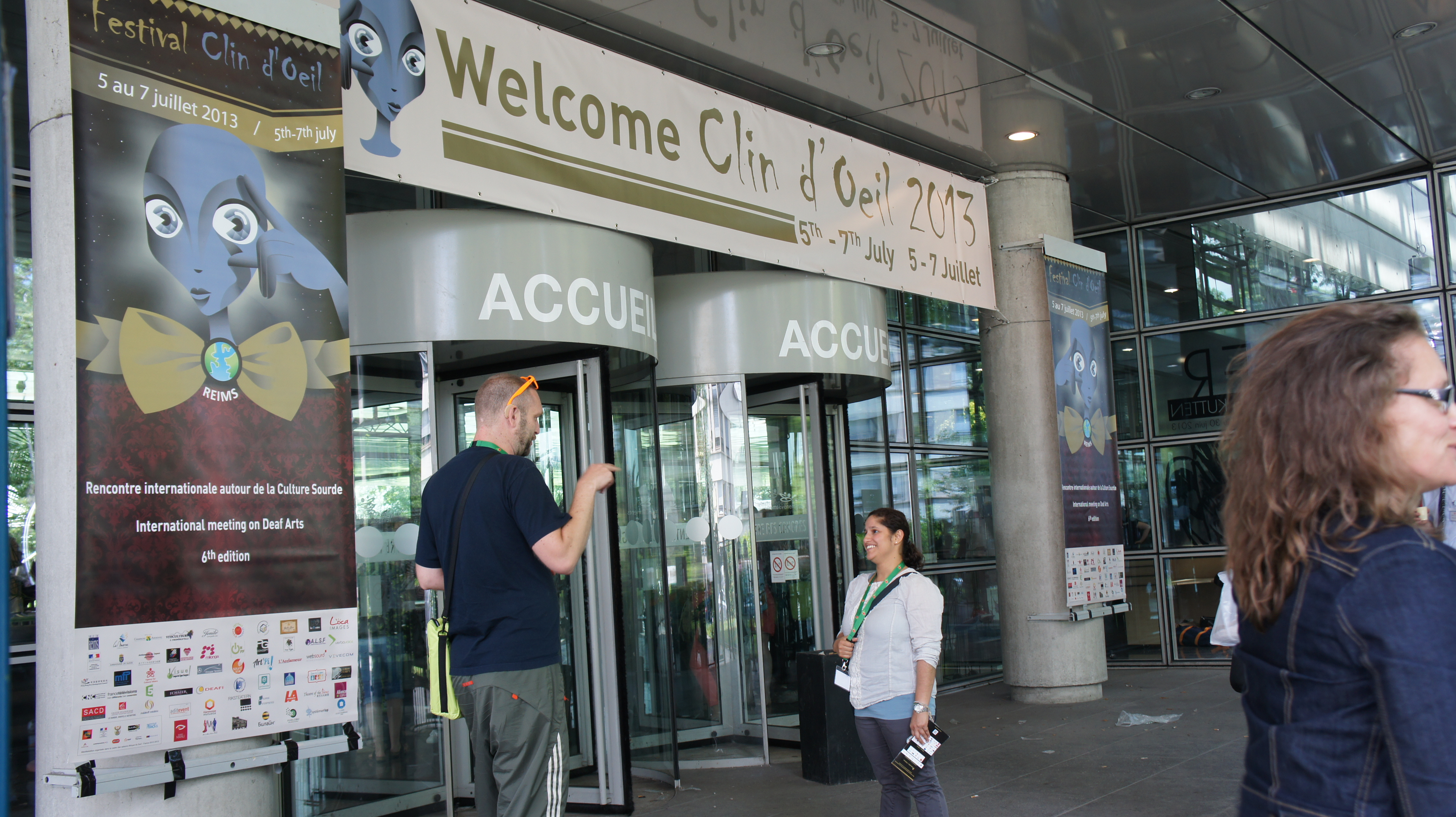 Festival Clin d'oeil 2013, animation au Centre des congrès .